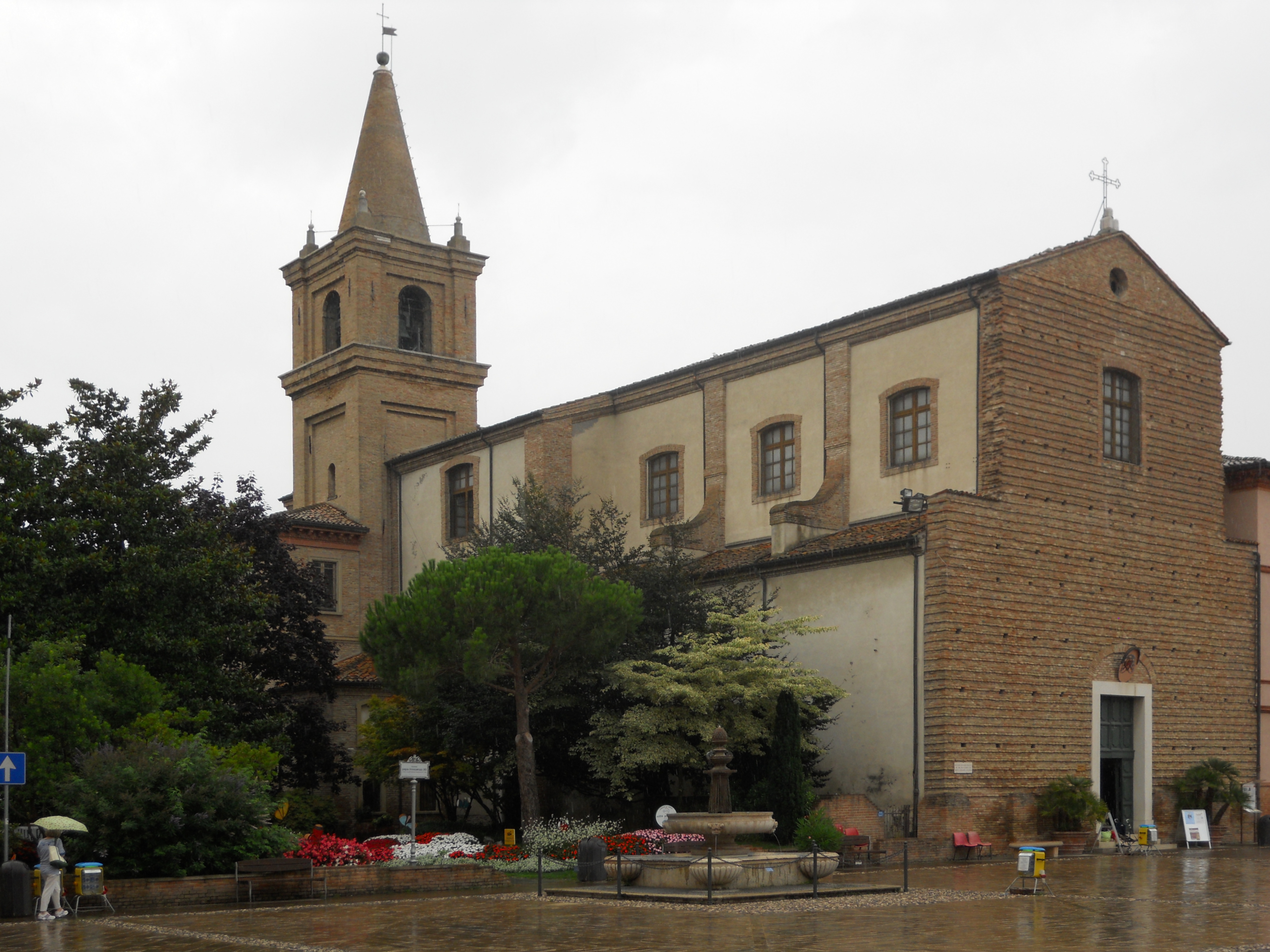 La Cattedrale